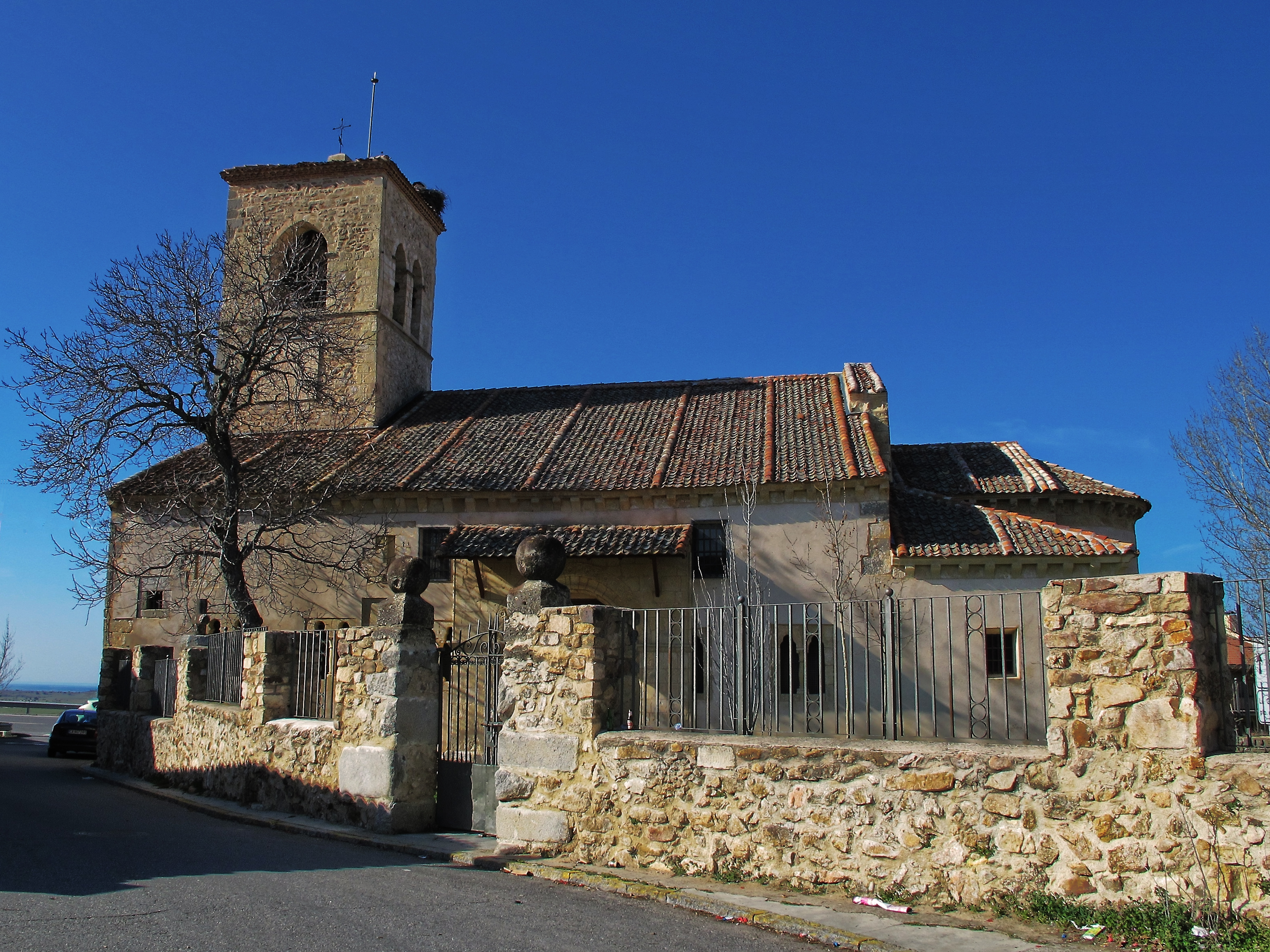 Iglesia de San Nicolás de Bari en la localidad de Torrecaballeros, provincia de Segovia, Castilla y León, España.